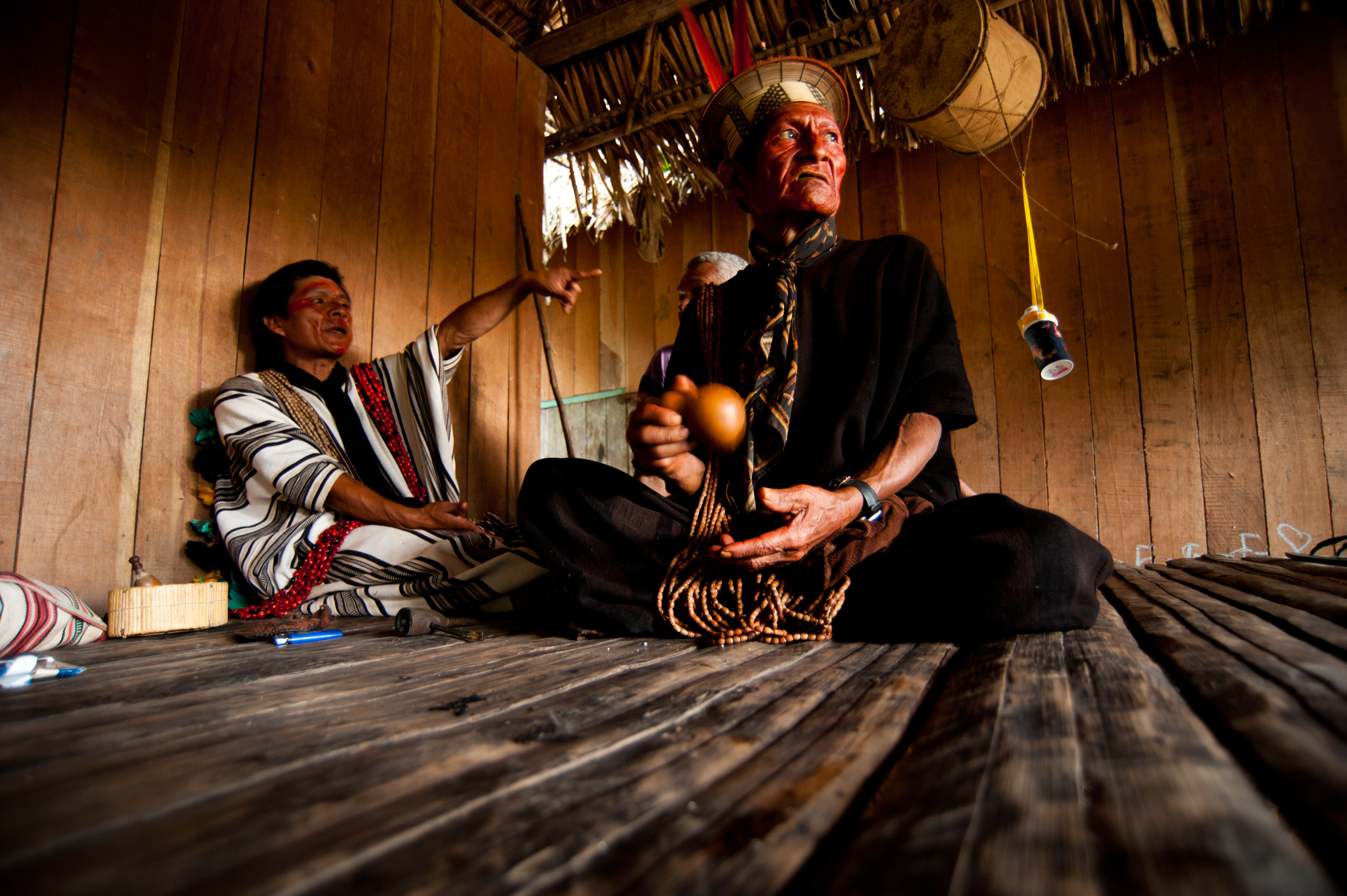 Indígenas Ashaninka Aldeia Apiwtxa Acre, Brasil © Pedro França/MinC